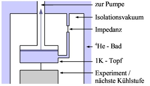 Schematische Darstellung eines Kryostaten mit (4)He-Verdampfungskühlung. Die Grafik ist selbst erstellt und unterliegt der GNU-FDL.